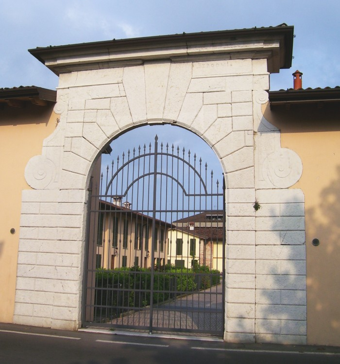 Portale d'ingresso della Cascina Pietà in San Zeno Naviglio